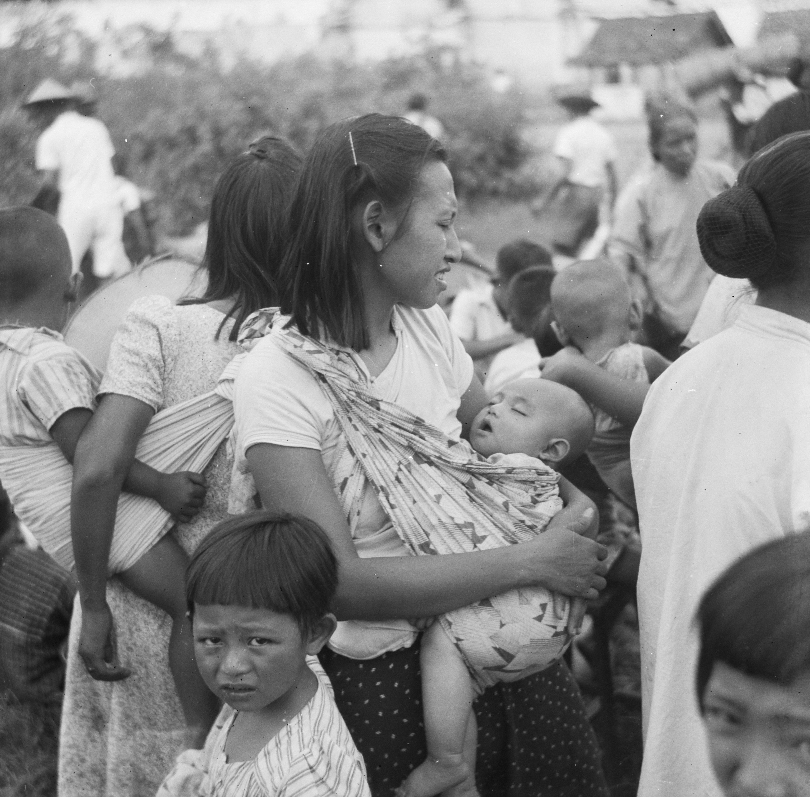 Collectie / Archief : Fotocollectie Dienst voor Legercontacten Indonesië Reportage / Serie : [ onbekend ] Beschrijving : [Indonesische vrouw met baby in slendang] Datum : 1948/02/01 Locatie : Indonesië, Nederlands-Indië Fotograaf : Fotograaf Onbekend / DLC Auteursrechthebbende : Nationaal Archief Materiaalsoort : Negatief (zwart/wit) Nummer archiefinventaris : bekijk toegang 2.24.04.03 Bestanddeelnummer : 12898